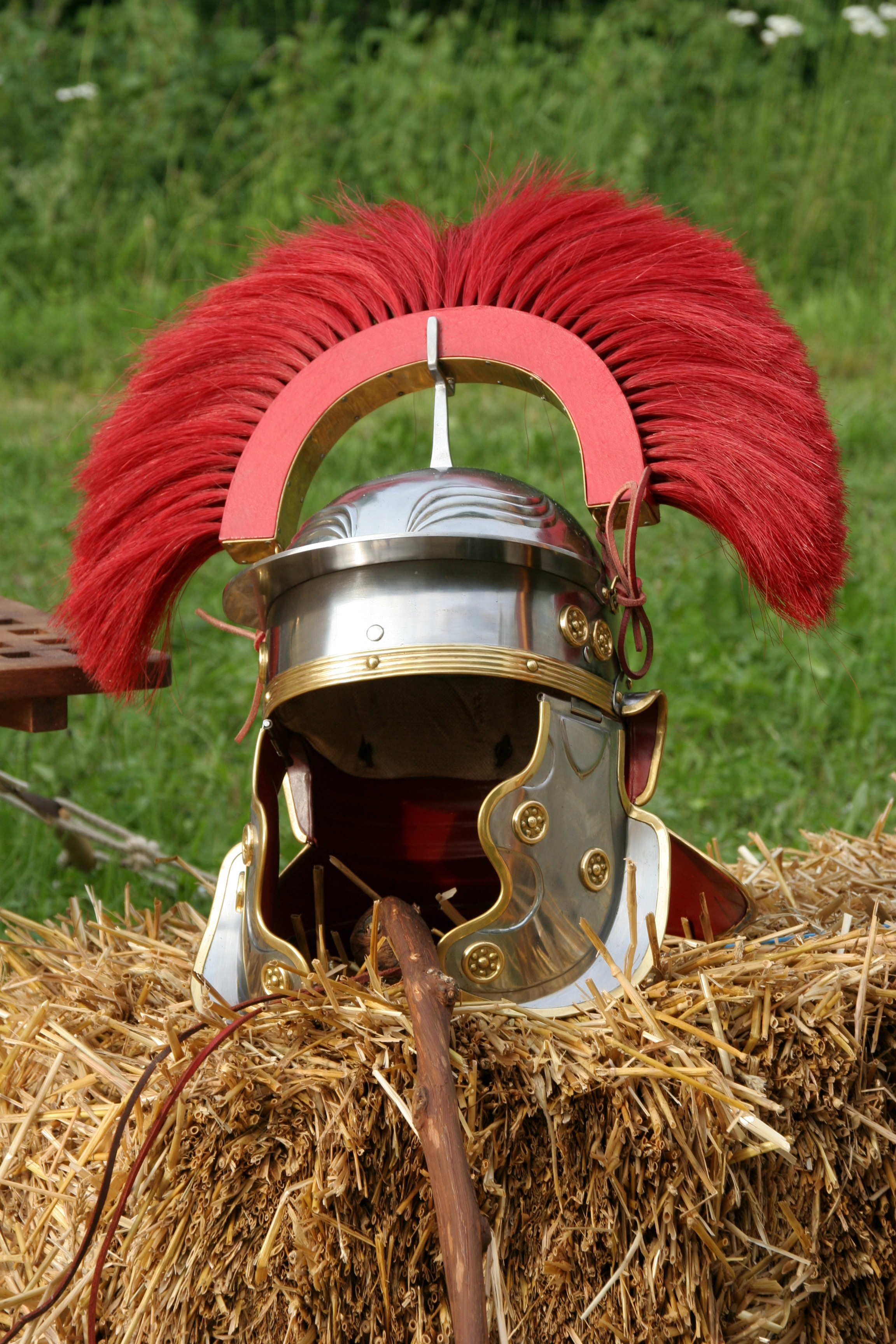 Helm vom Typ Weisenau eines römischen Centurios aus dem 2. Jahrhundert. Vorne ist noch die Vitis, Rangabzeichen der Centurionen, zu sehen.